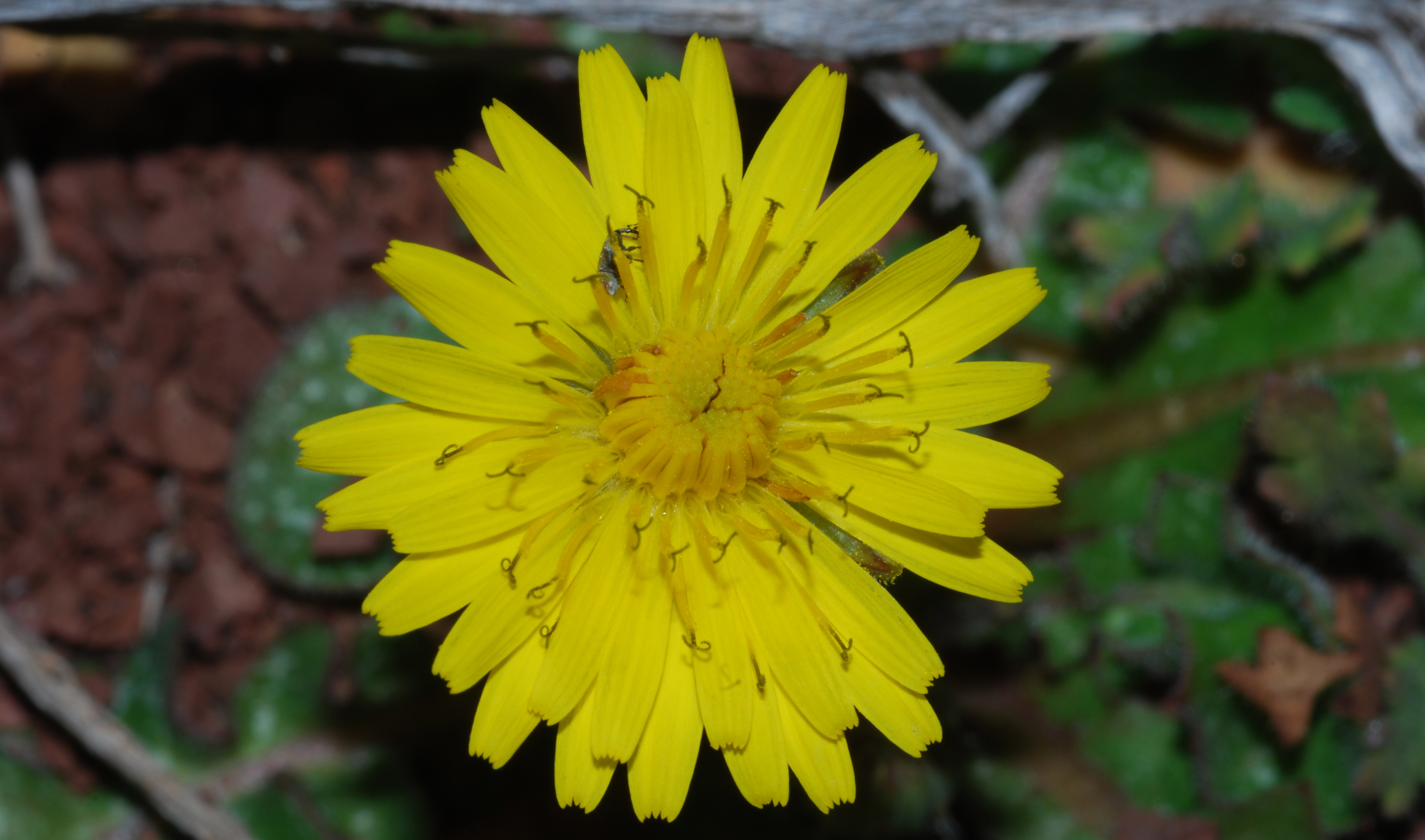 Octon, Hérault, FRANCE